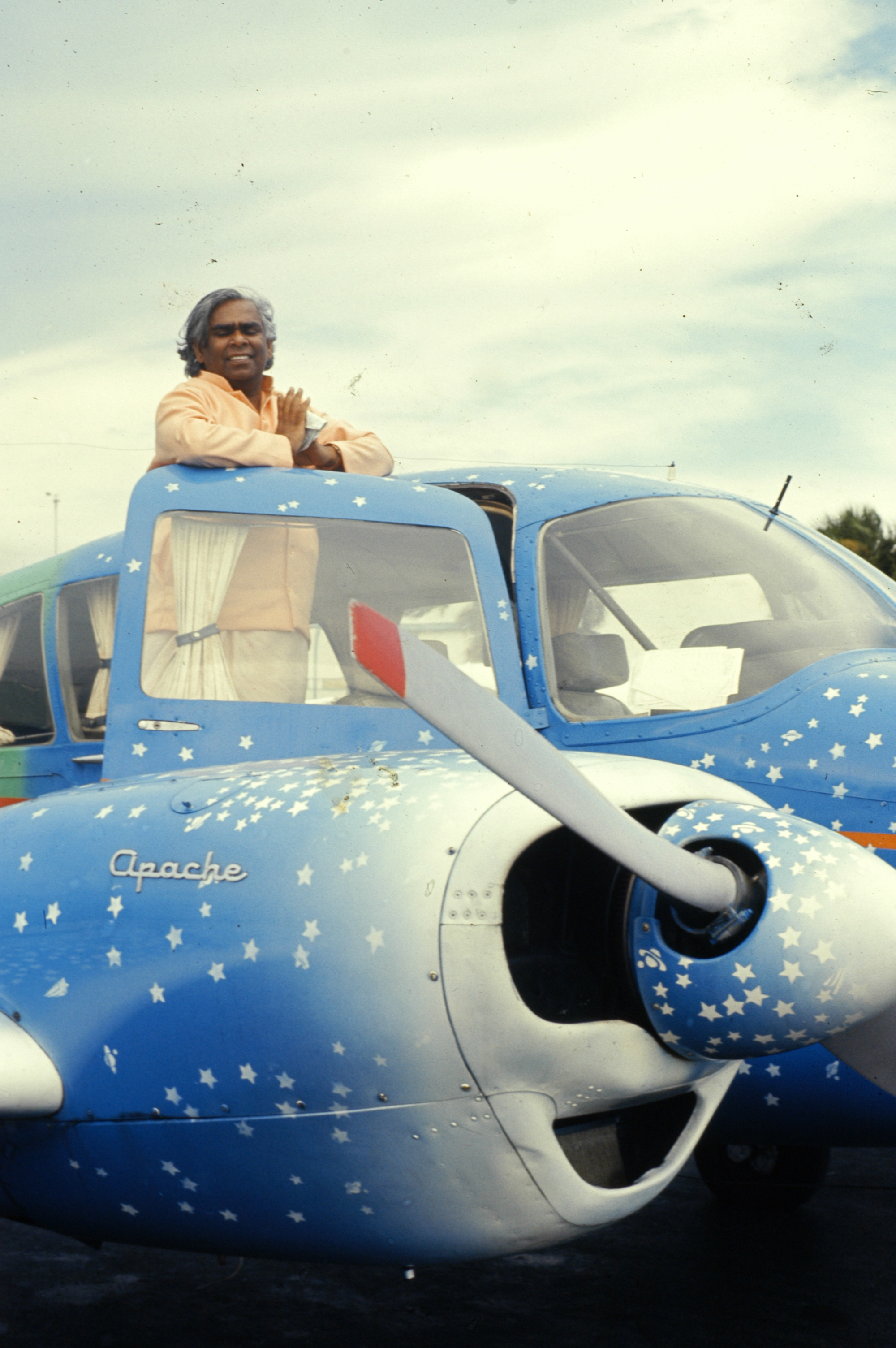 Swami Vishnudevananda - Der fliegende Swami bei einer seiner Friedensmissionen